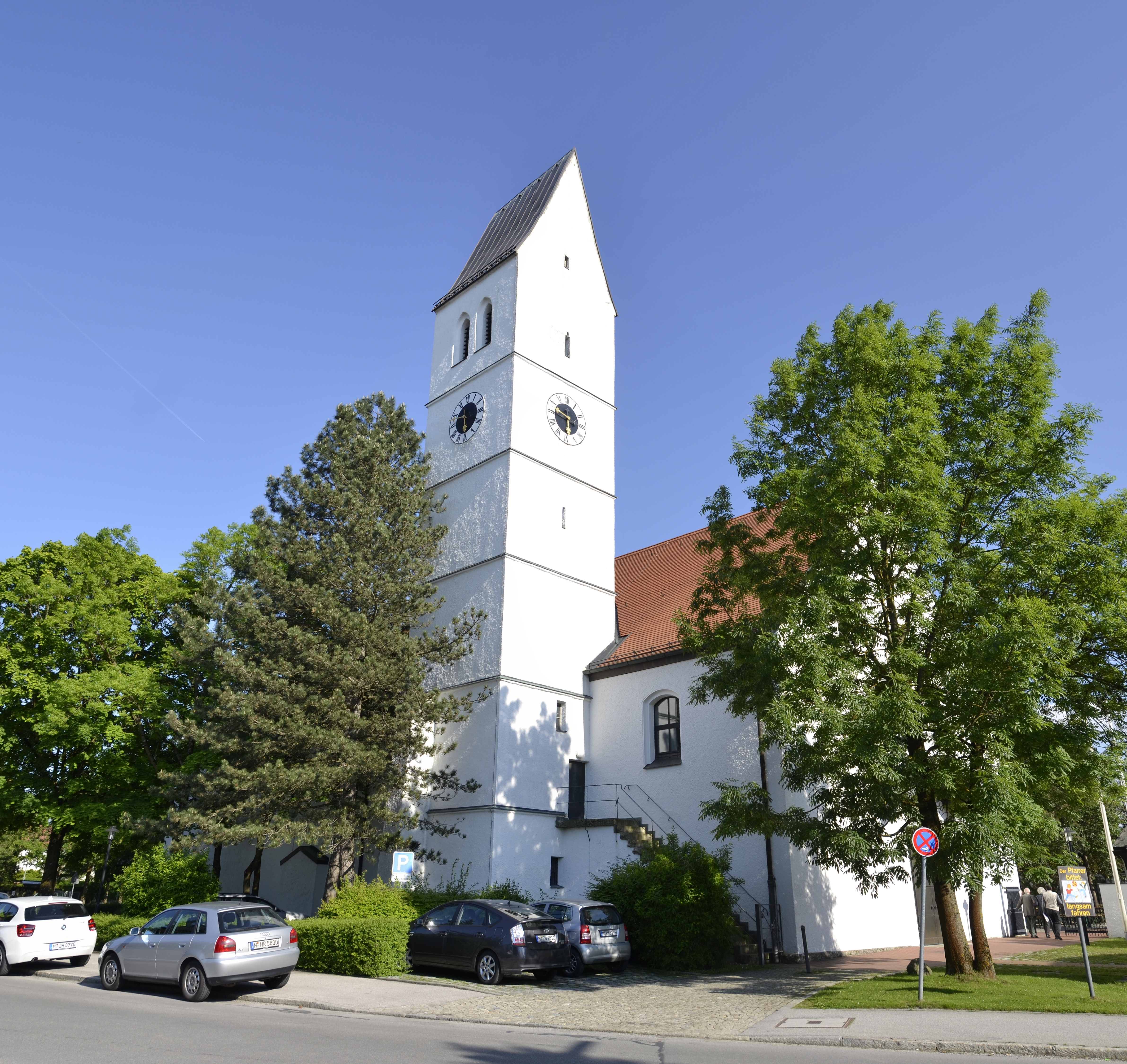 Die Kirche St. Peter und Paul in München-Trudering.